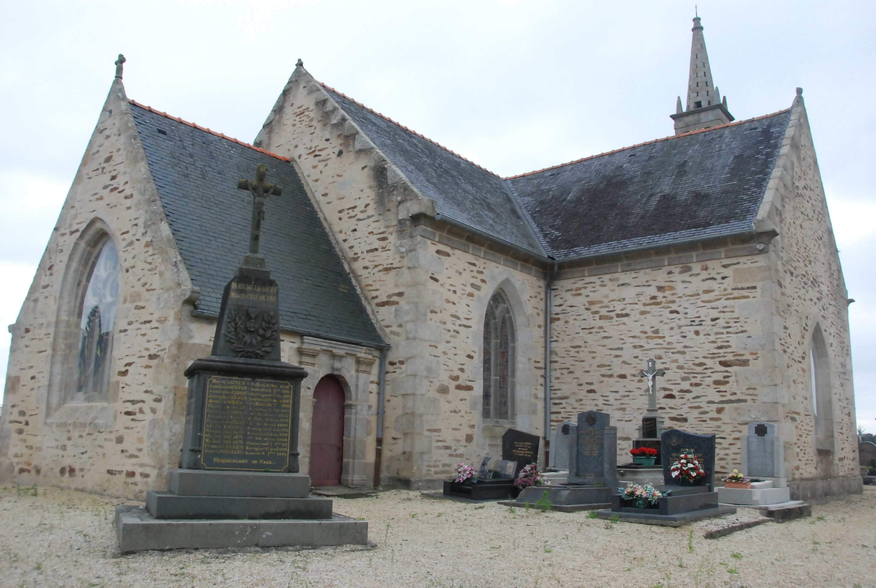 Monument aux morts - Lanarvily-29